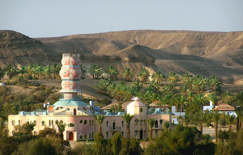 נאות סמדר - נאת מדבר אורגנית בנגב הדרומי